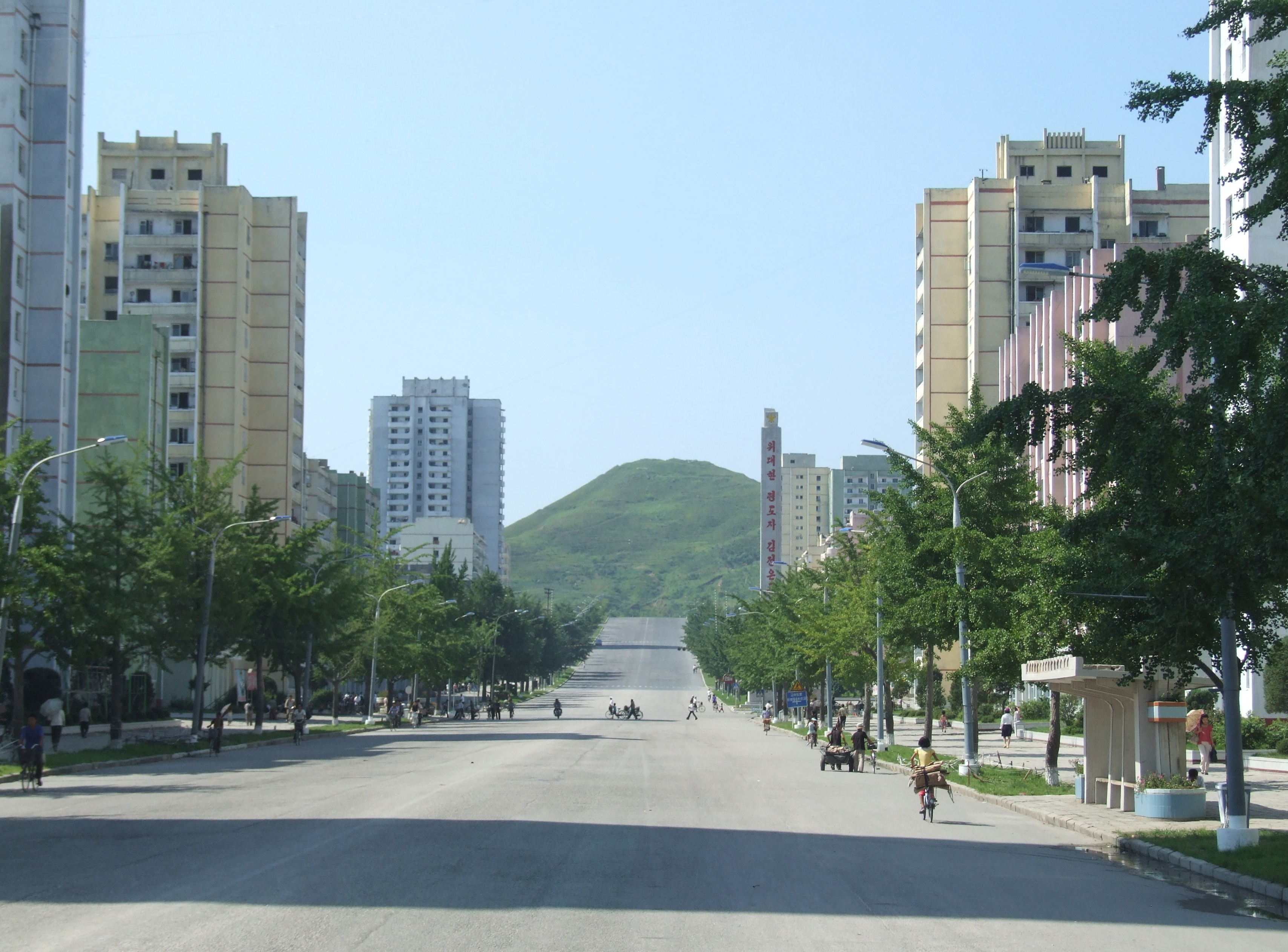 Straße in Kaesong